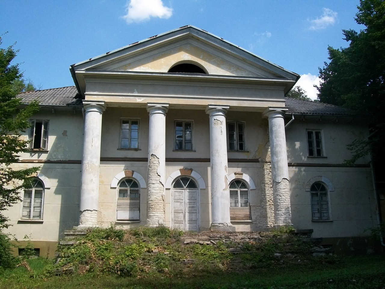 Olszanka - pałac, pocz. XIX